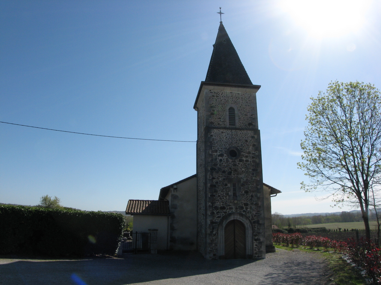 Kirche von Saint Pée de Leren (Departement Pyrénées-Atlantiques) in den Pyrenäen.